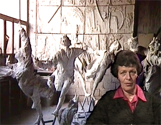 Portrait de Roseline Granet